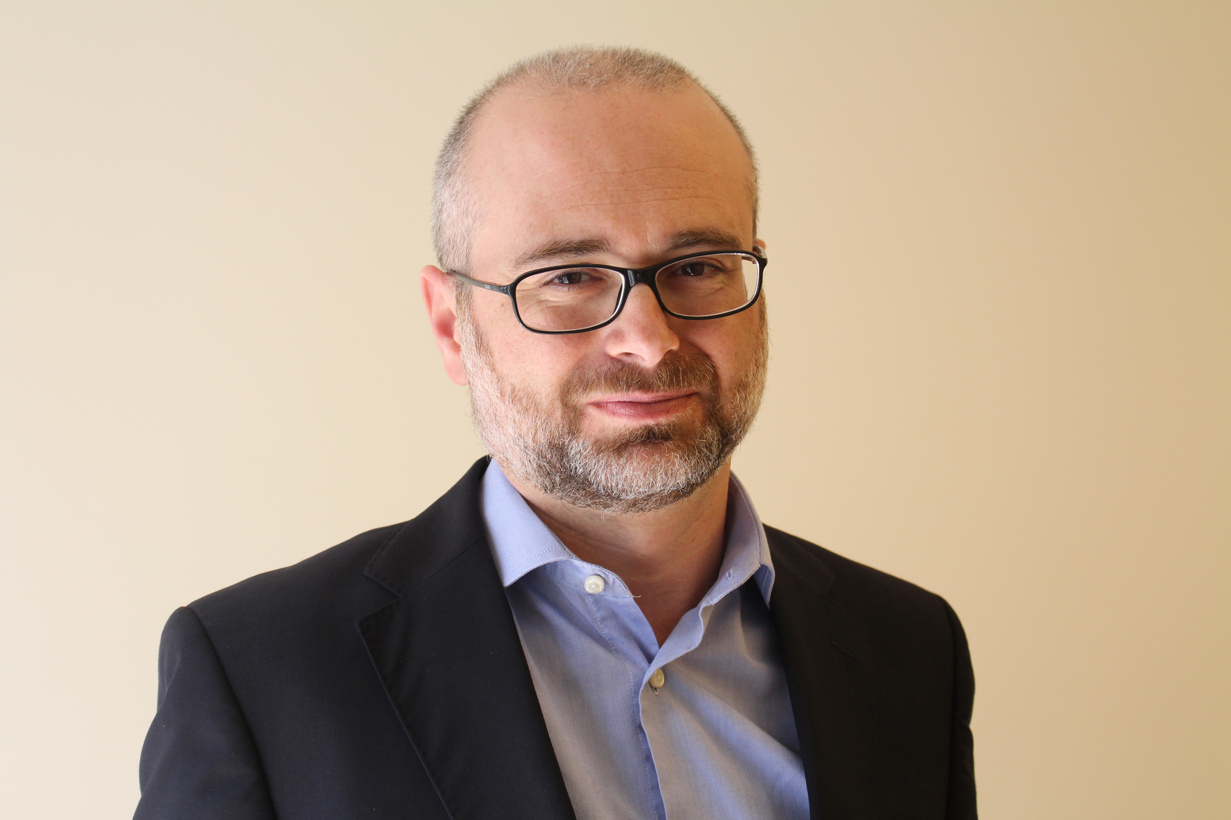 Fotografia corporativa de Bastonário da Ordem dos Psicólogos Portugueses